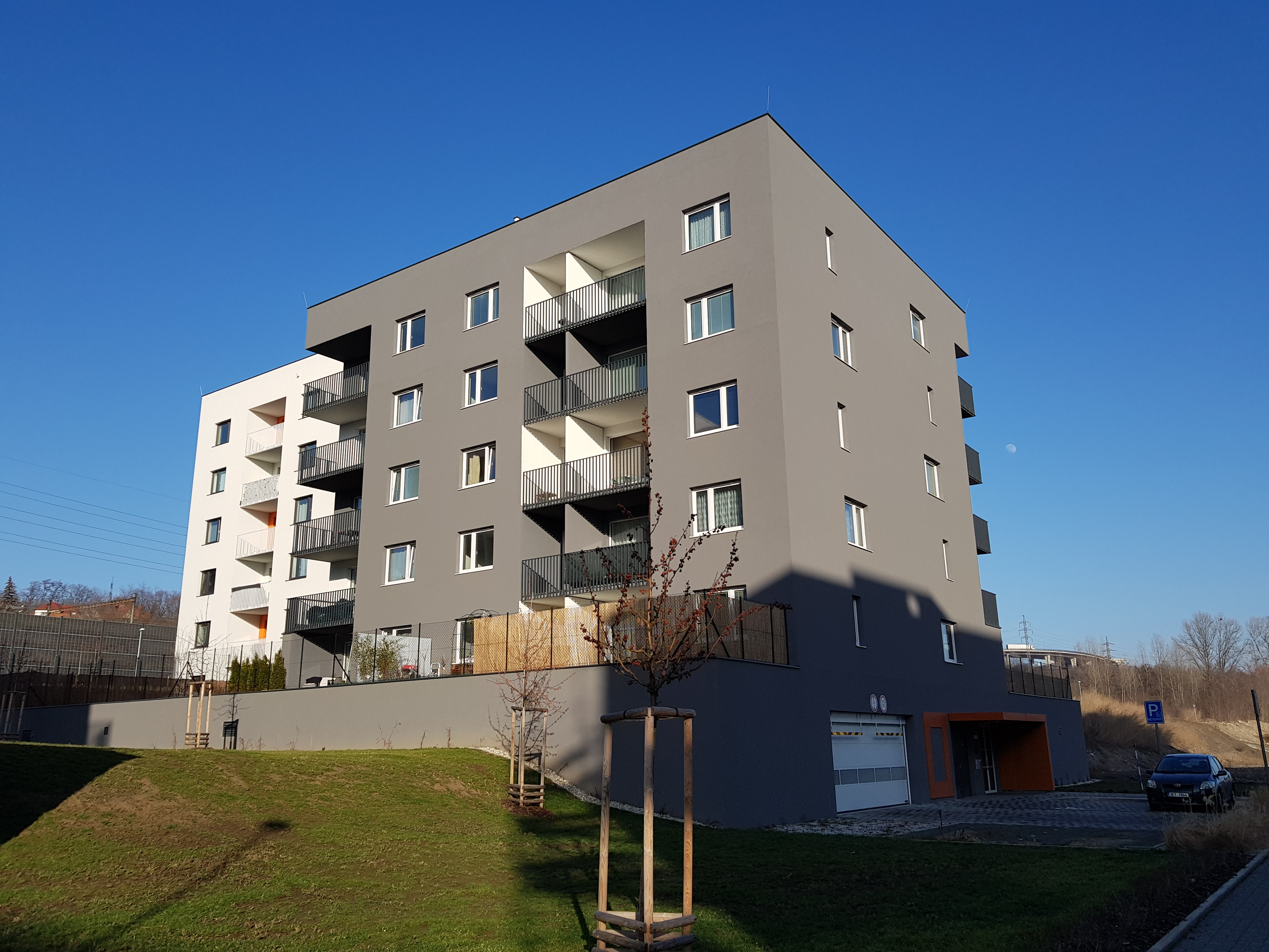 Strnadových čp. 1009/9, Praha 9 - Vysočany